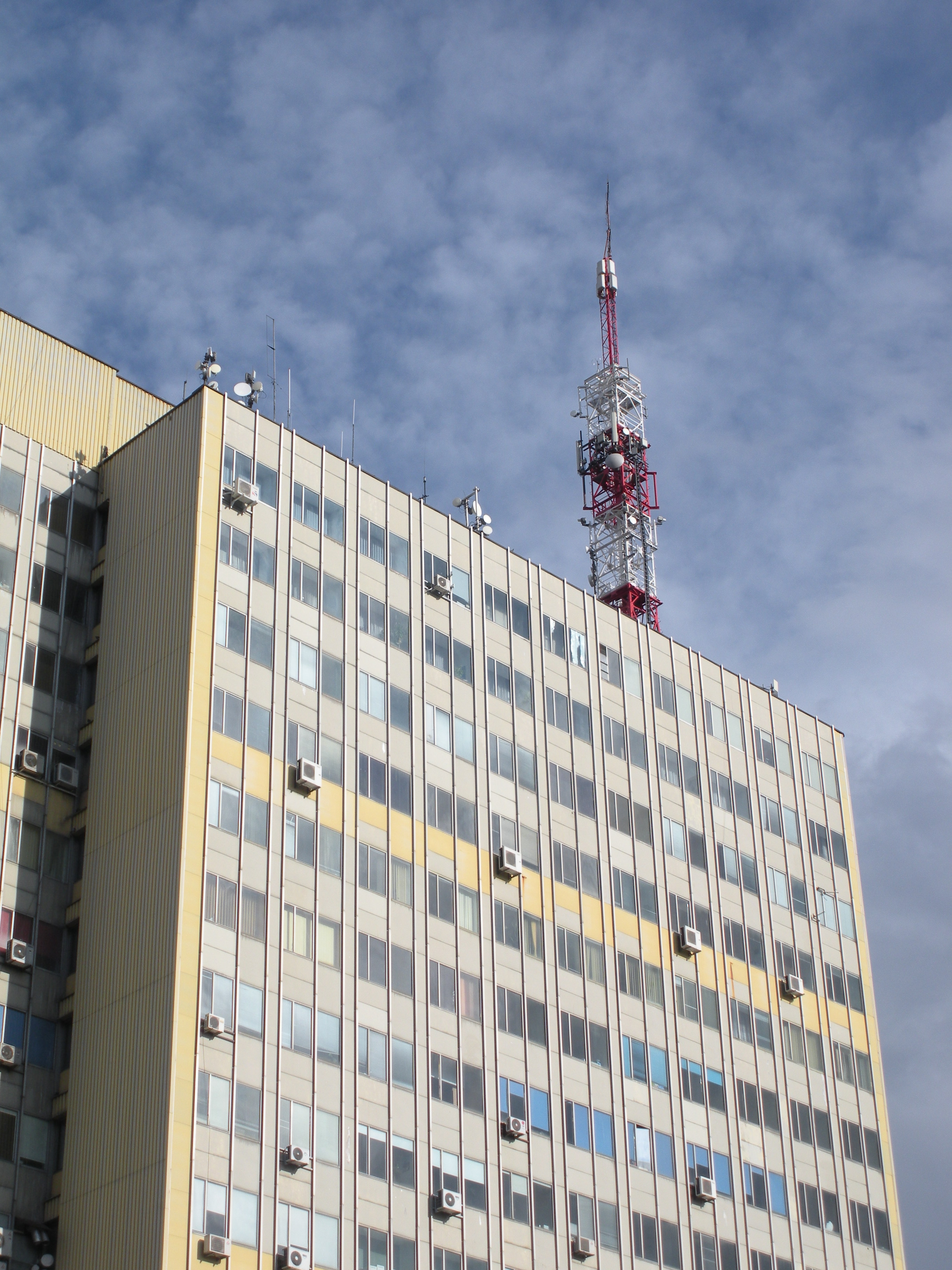 SLR Targowa